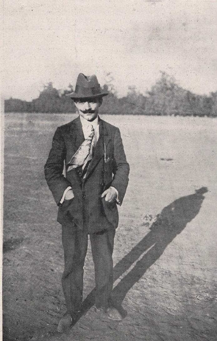 "Cattaneo en el Parque Cousiño". Bartolomeo Cattaneo realizó, en el mes de diciembre de 1910, el primer vuelo sobre la ciudad de Santiago de Chile.